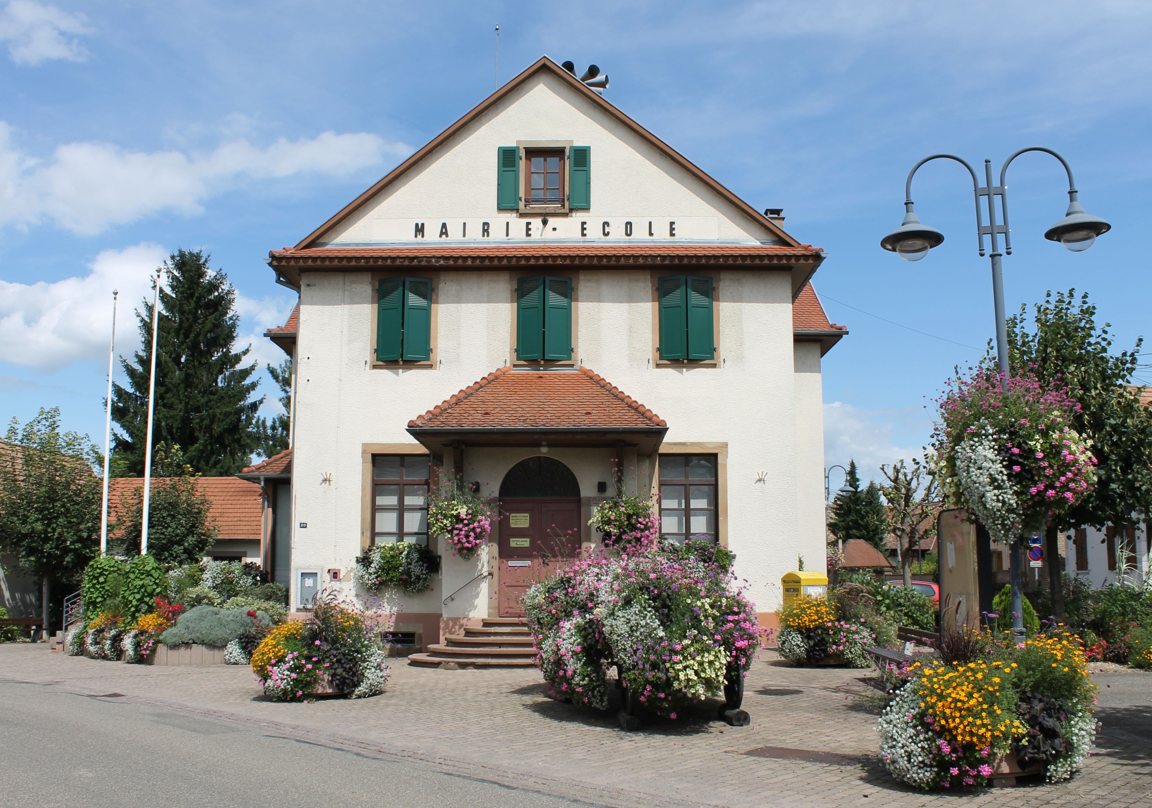 Mairie und Schule in Ittenheim, Elsass .